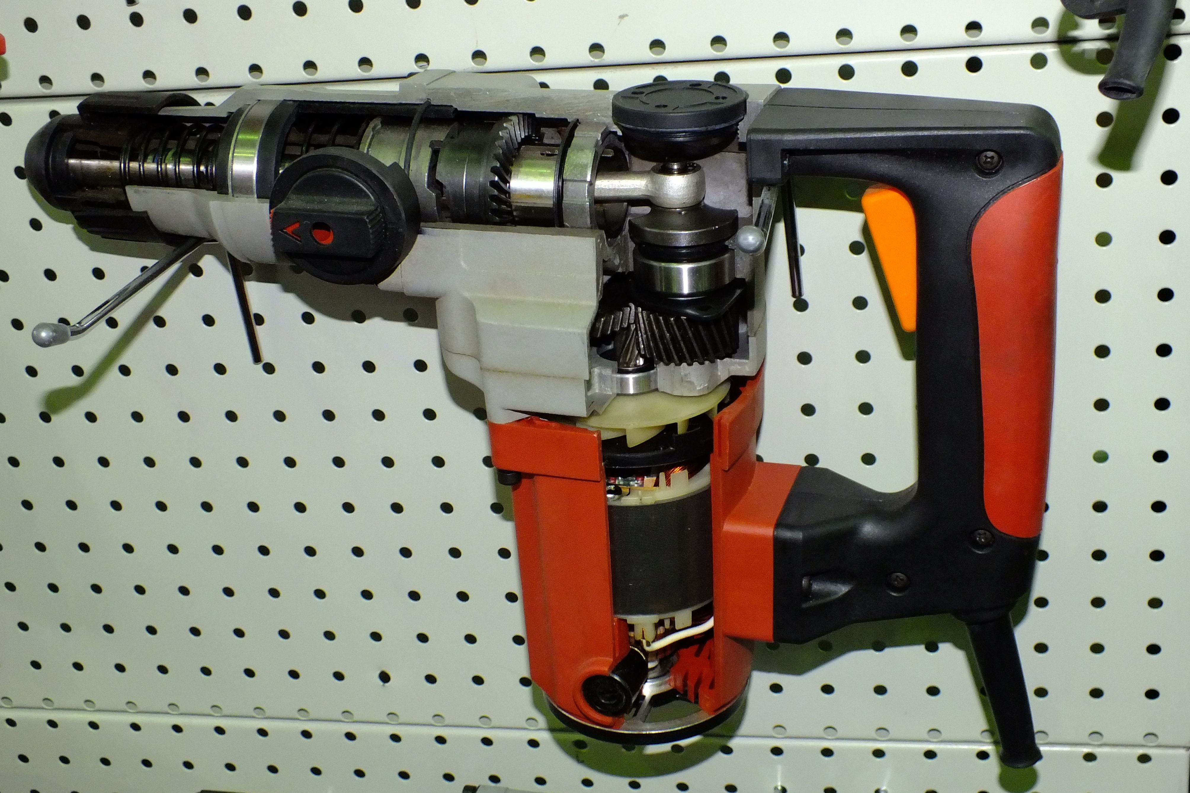 Перфоратор на выставке, в разрезе